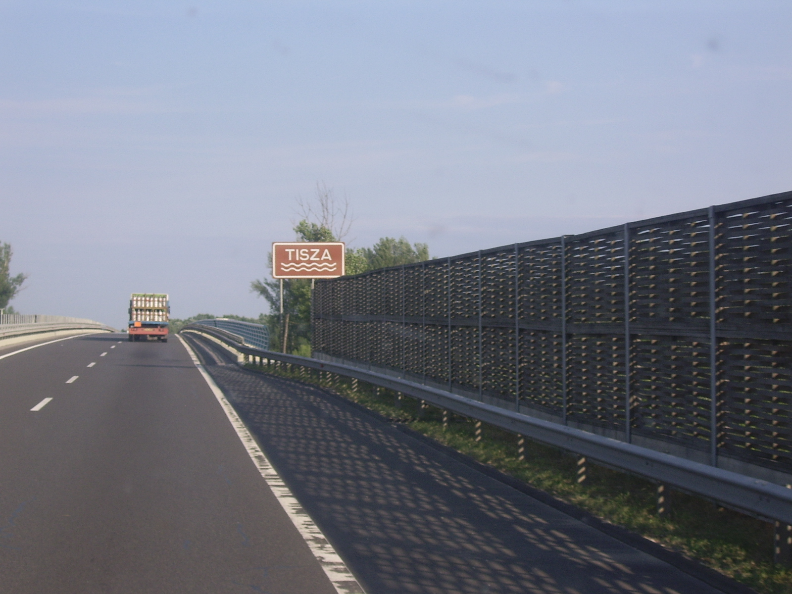 Az M3-as autópálya polgári Tisza hídját jelző tábla (Oszlár)